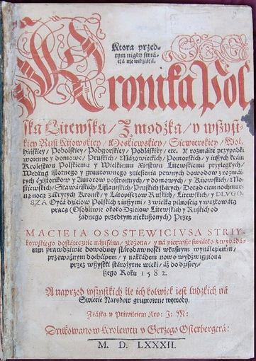 Тытульны аркуш «Хронікі польскай, літоўскай, жамойцкай і ўсяе Русі». Каралявец. 1582